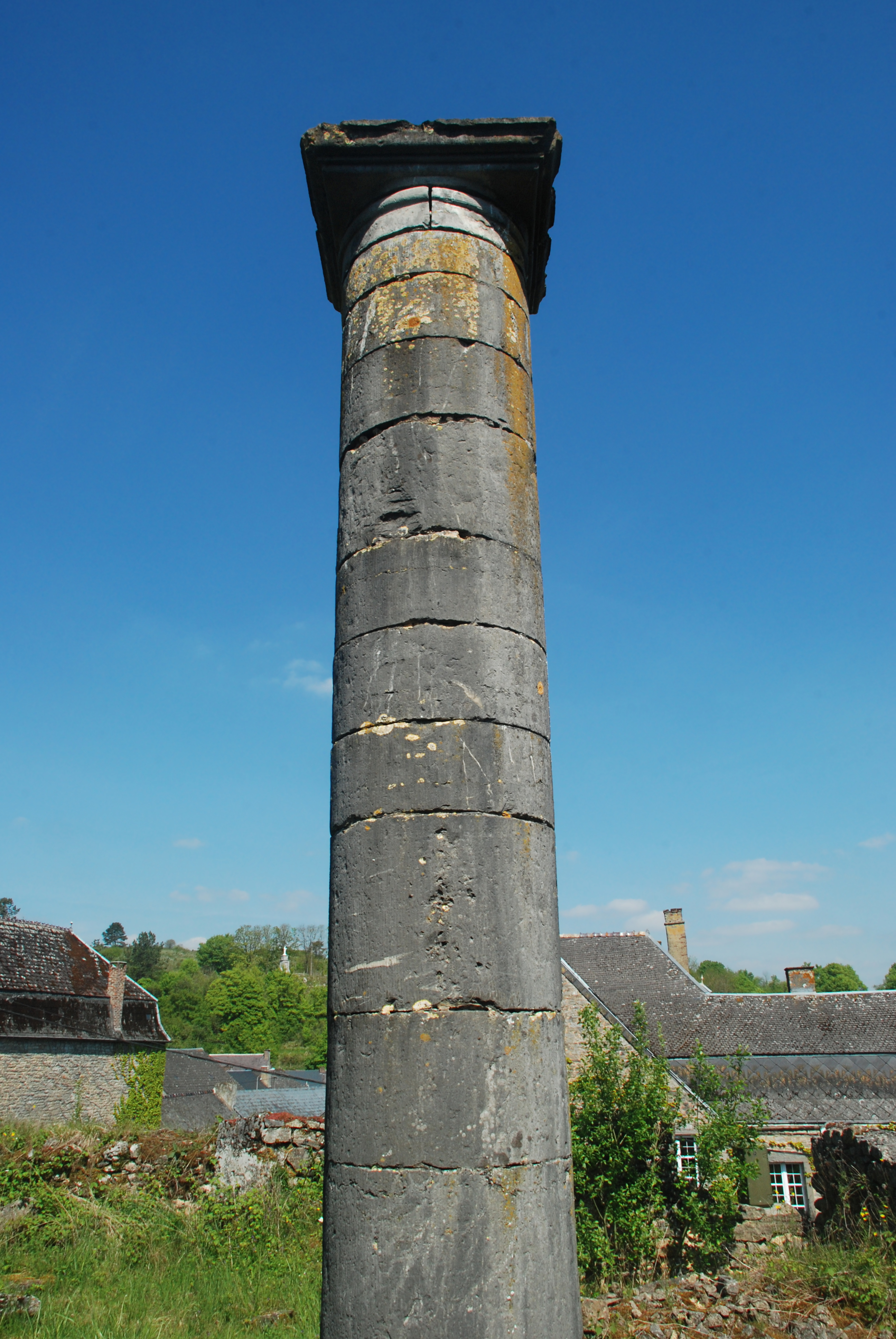 Belgique - Province de Namur - Viroinval - Nismes - Ancienne église Saint-Lambert (1606)